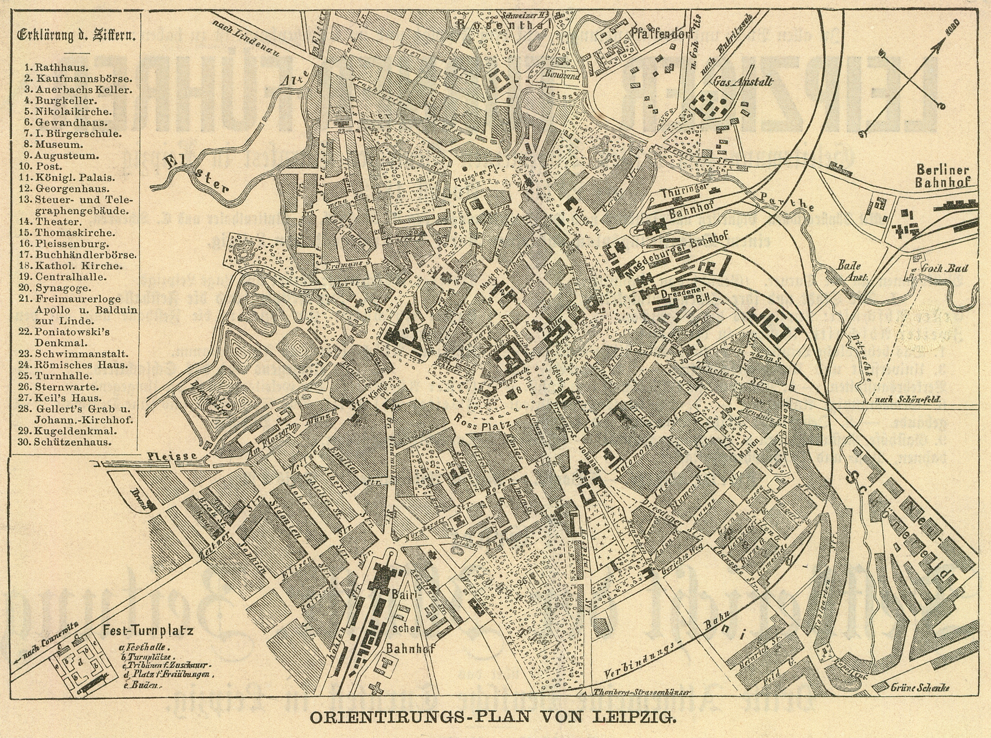 Stadtplan von Leipzig, 1863, mit eingezeichnetem Festplatz (Deutsches Turnfest)